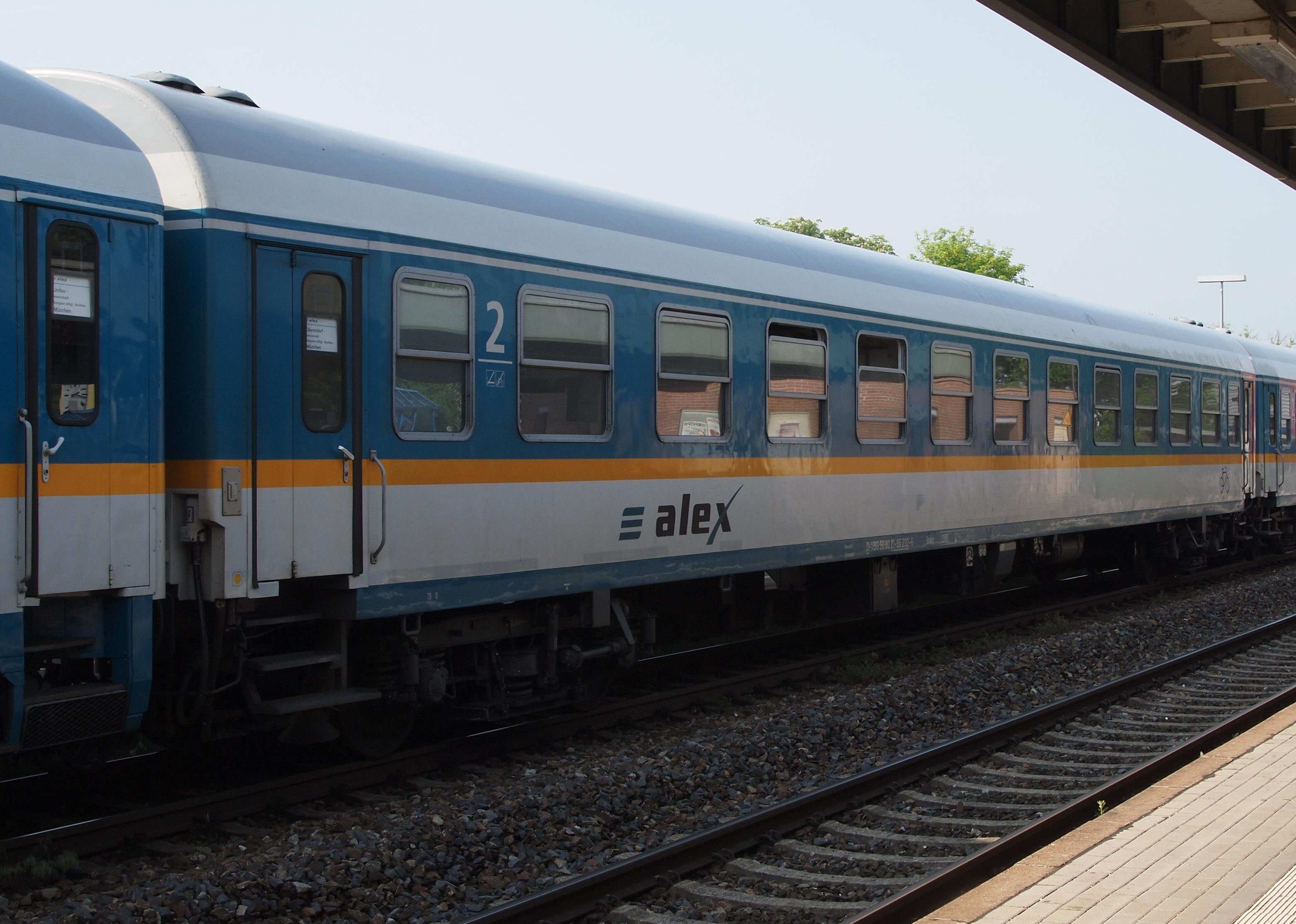 UIC-Z-Wagen beim alex (D-VBG 56 80 21-95 232-6, vormals Baureihe Bomz236)